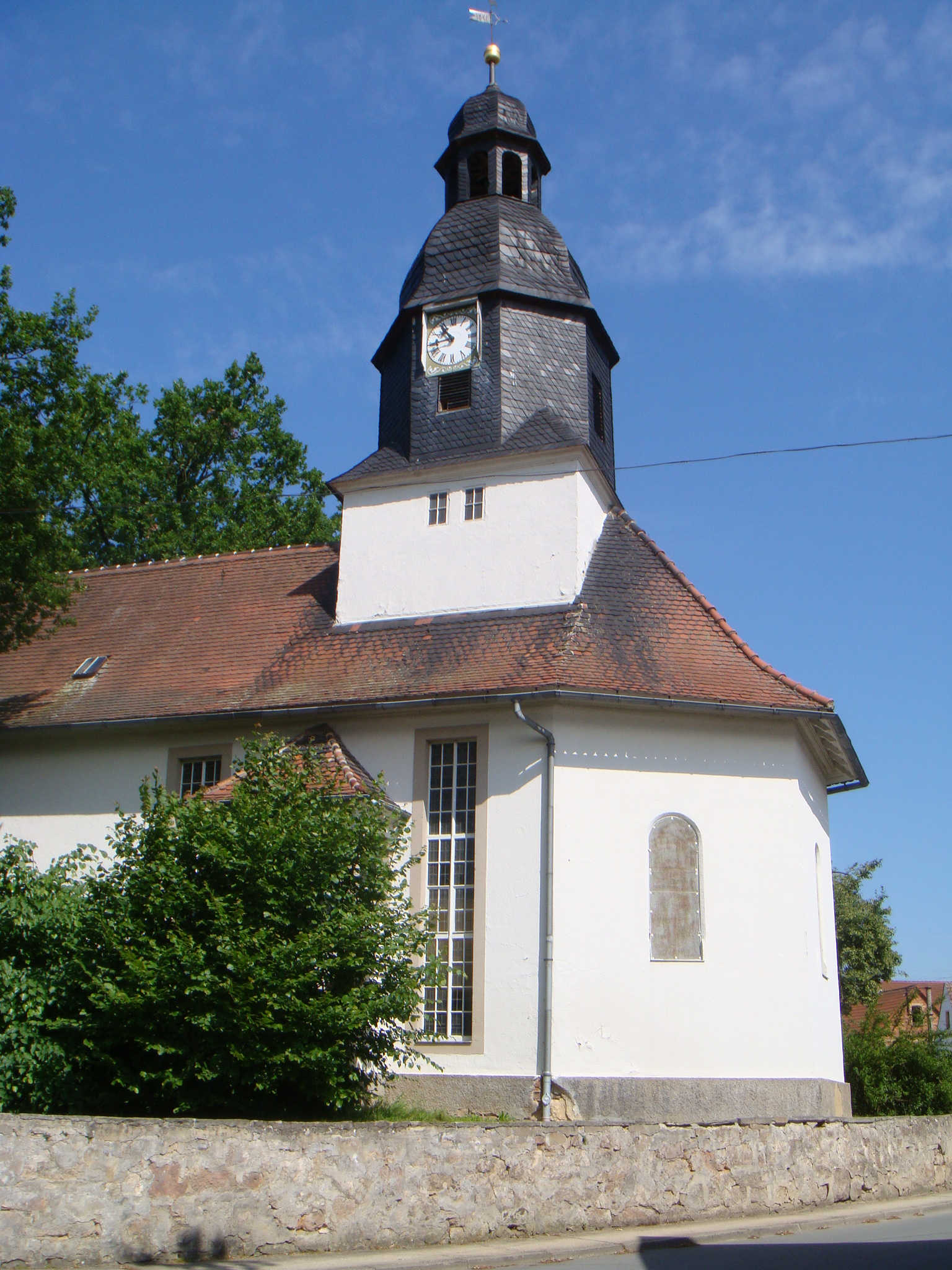 Dorfkirche Hainspitz